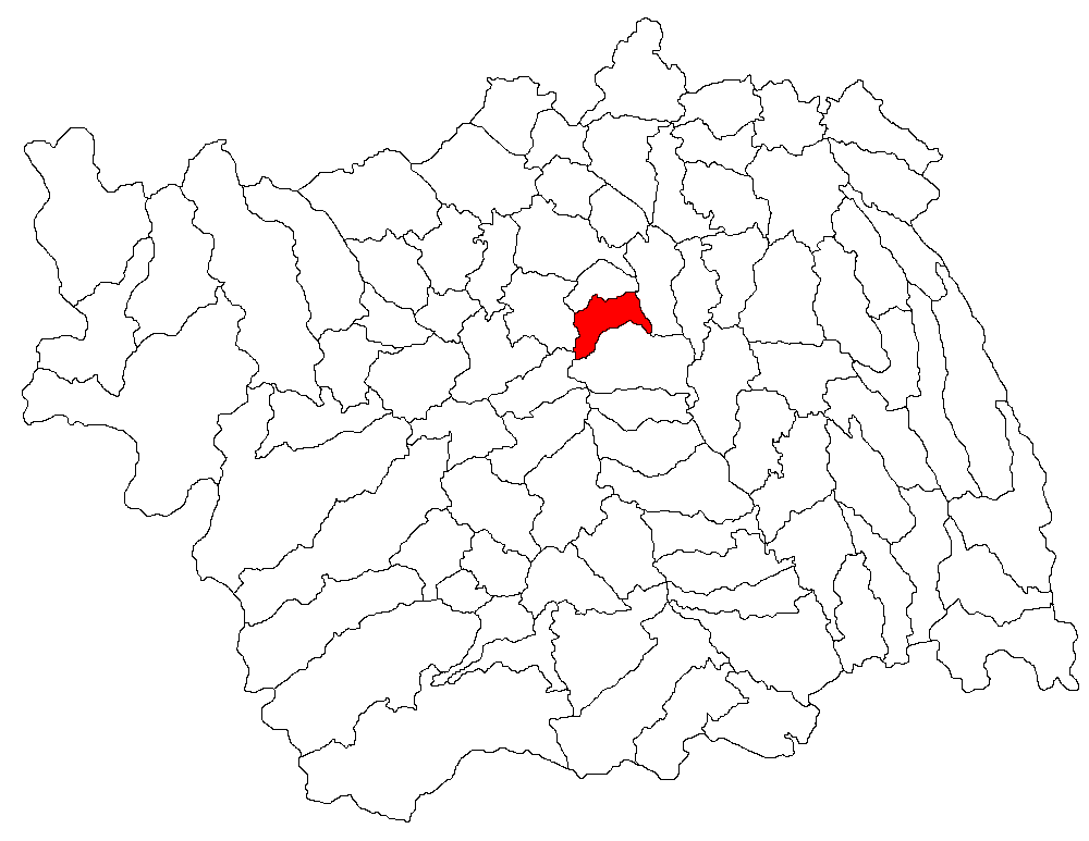 Categorie:Hărţi ale judeţului Bacău